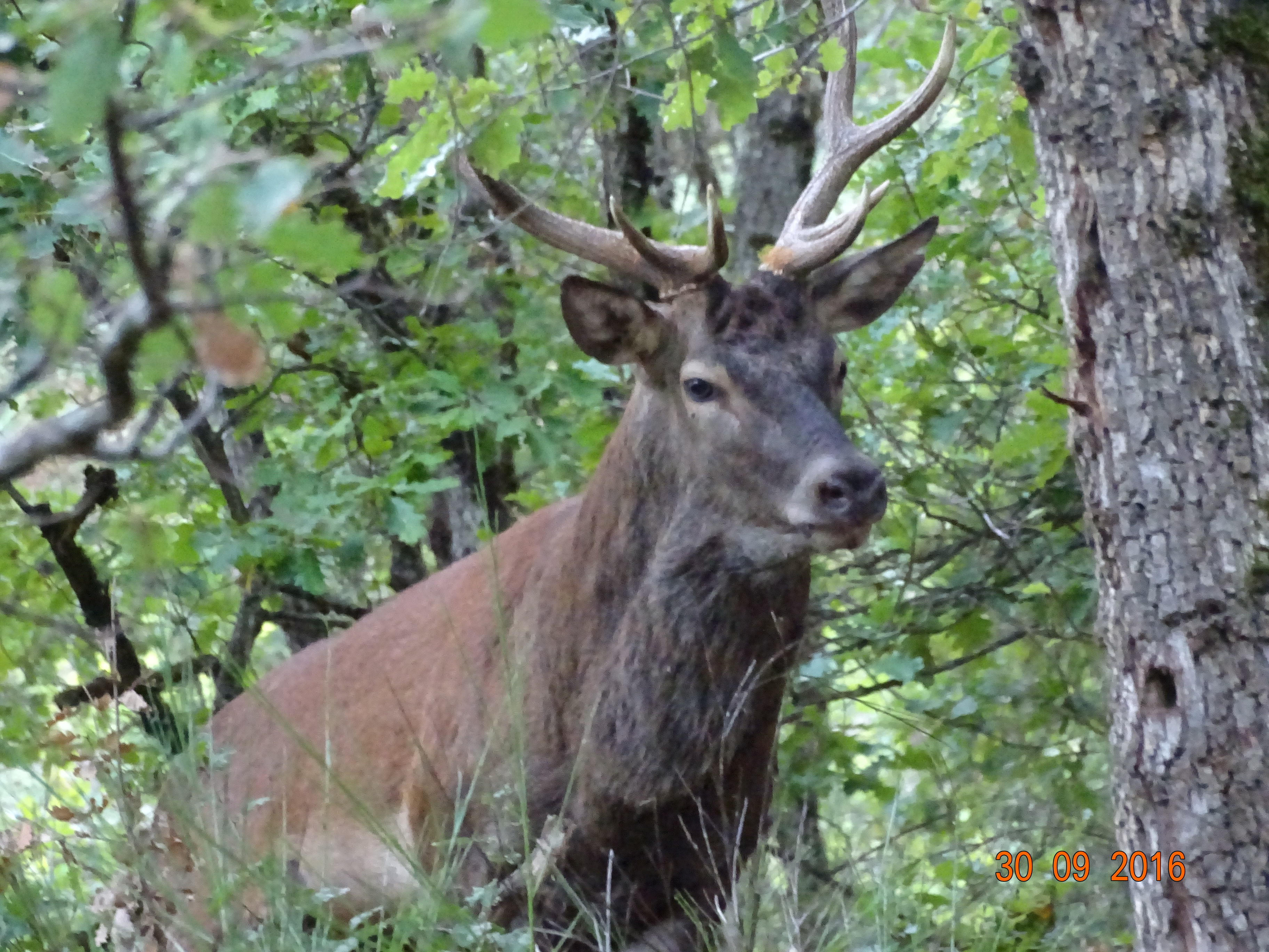 Cerf bramant photographier sur la commune de Torsiac